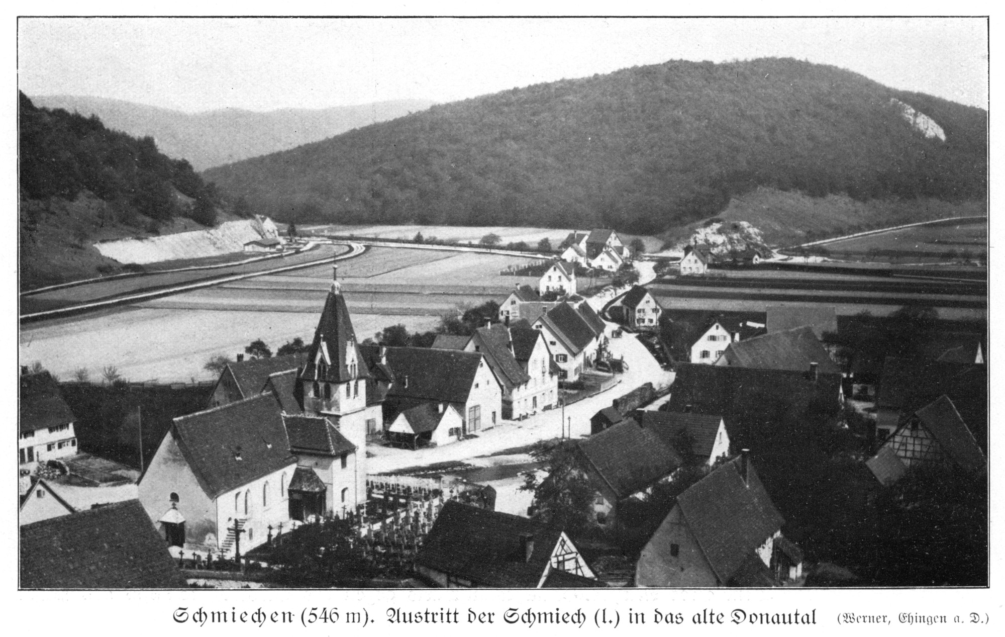 Schmiechen (Schelklingen) im Schmiechtal (546 m). Austritt der Schmiech (links) in das alte Donautal.